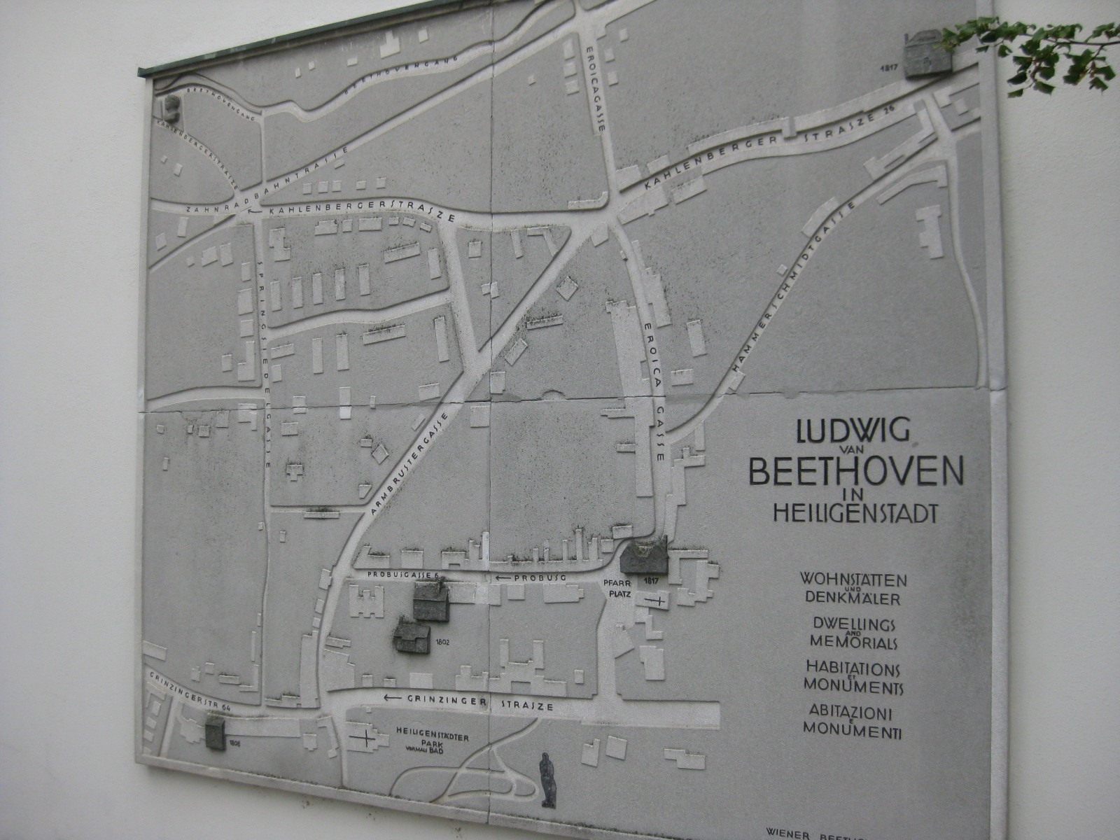 Gedenktafel am Pfarrplatz in Wien-Heiligenstadt, die Beethovens Wohnungen in der näheren Umgebung zeigt